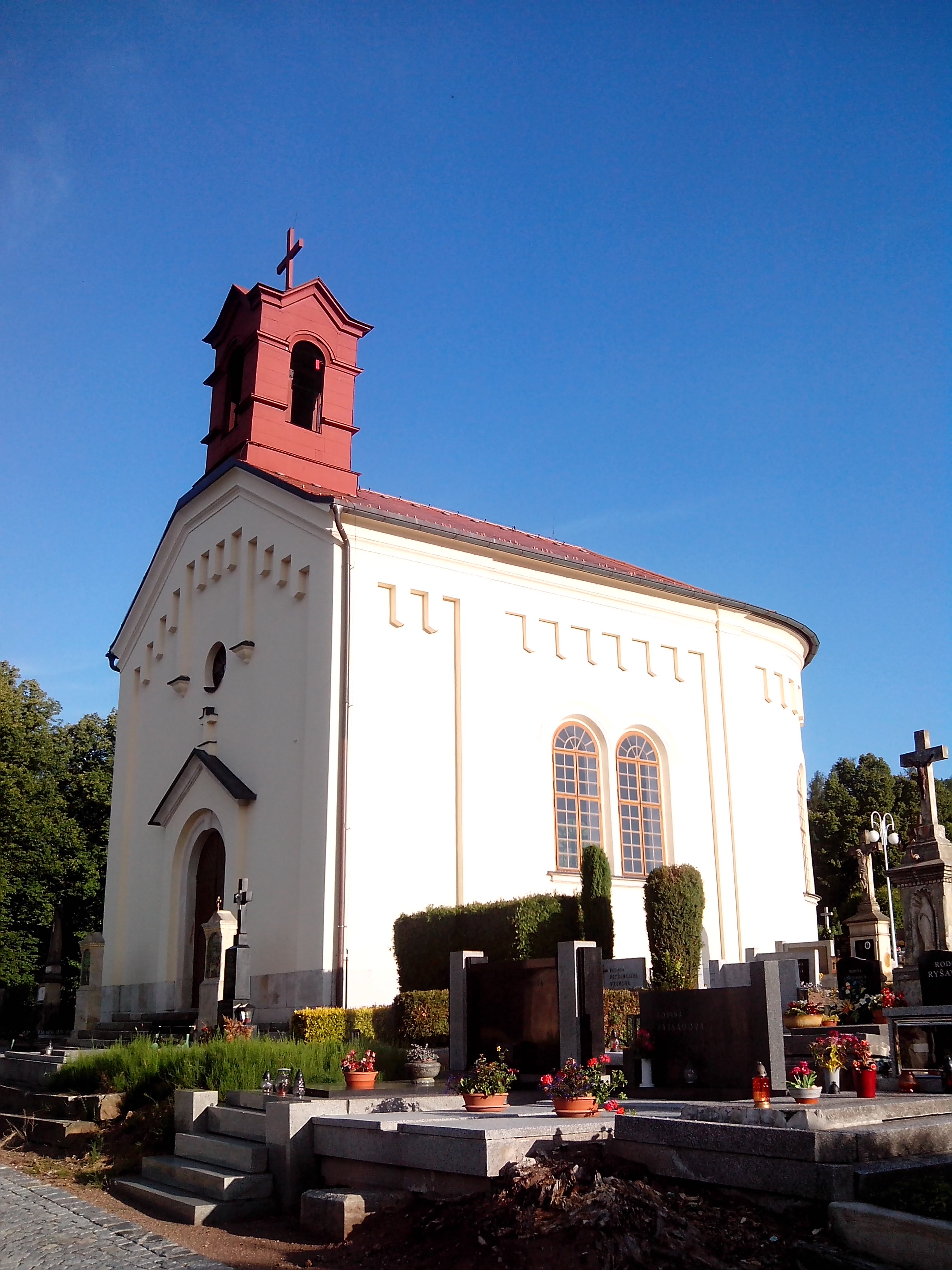 Hřbitovní kaple sv. Cyrila a Metoděje v Červemém Kostelci